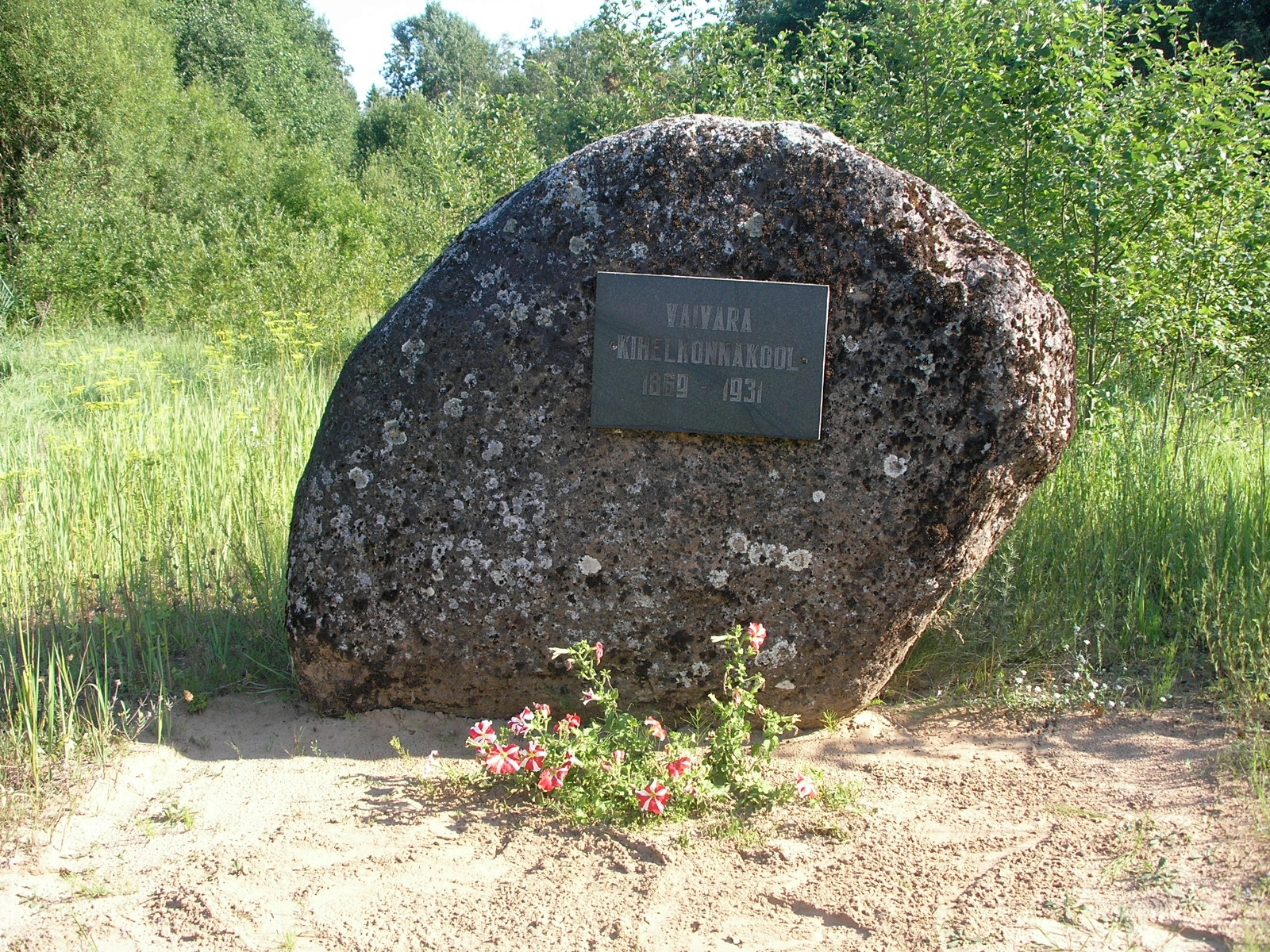 Vaivara kihelkonnakooli mälestuskivi Sinimägede lähedal